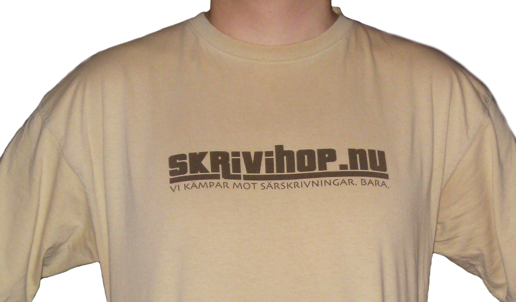 T-shirt med Skrivihop.nu-loggan. Sajten skriver att tröjan är tryckt med språkfascistbrunt tryck på militantkhakibeigebrunaktig bakgrund